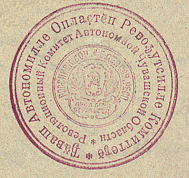 Печать "Революционный Комитет Автономной Чувашской Области". "Ꚋӑваш Автономилле Оплаҫтӗн Ревоԡутсилле Комиттеꚋӗ"